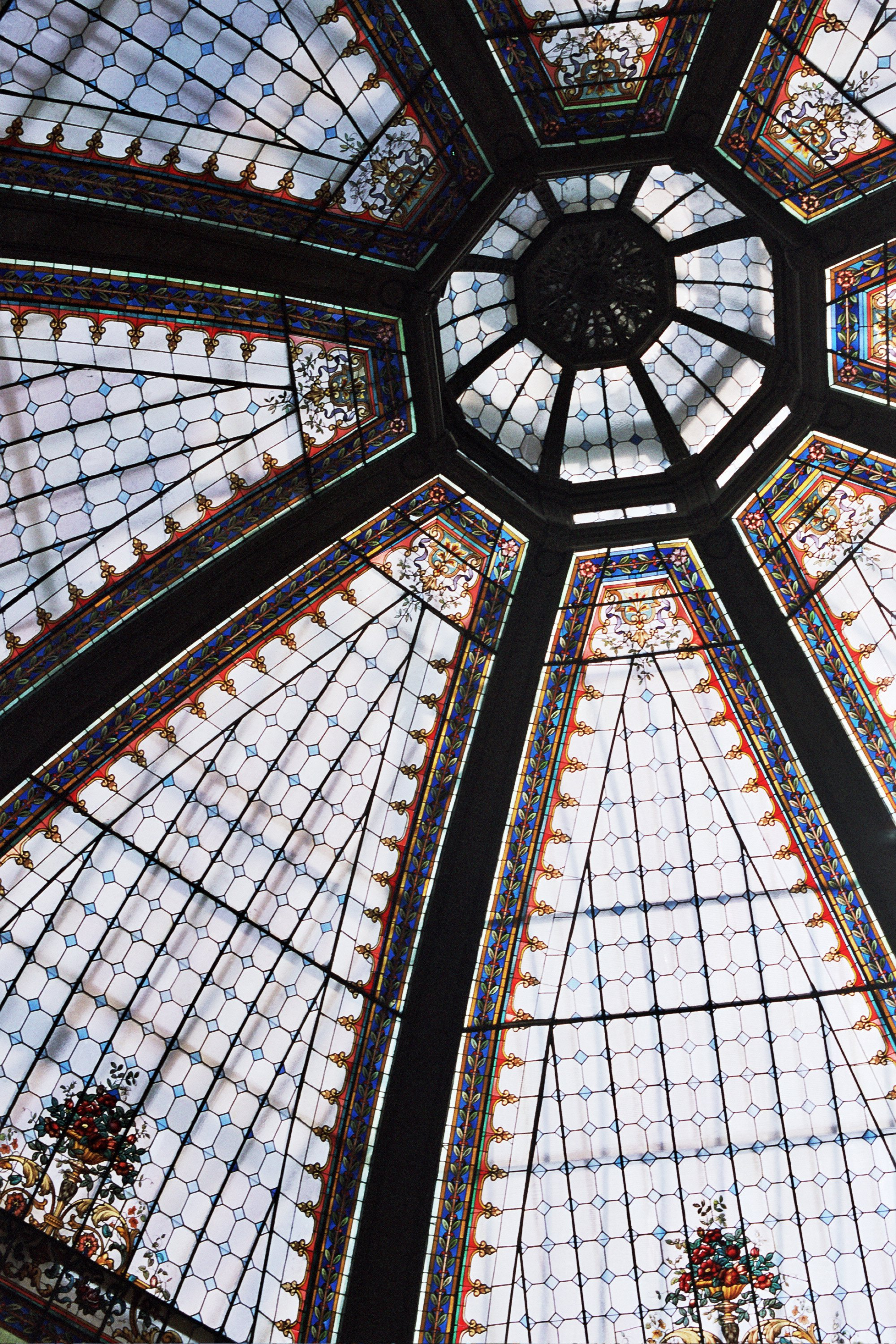 Roof in Oktogon, Zagreb